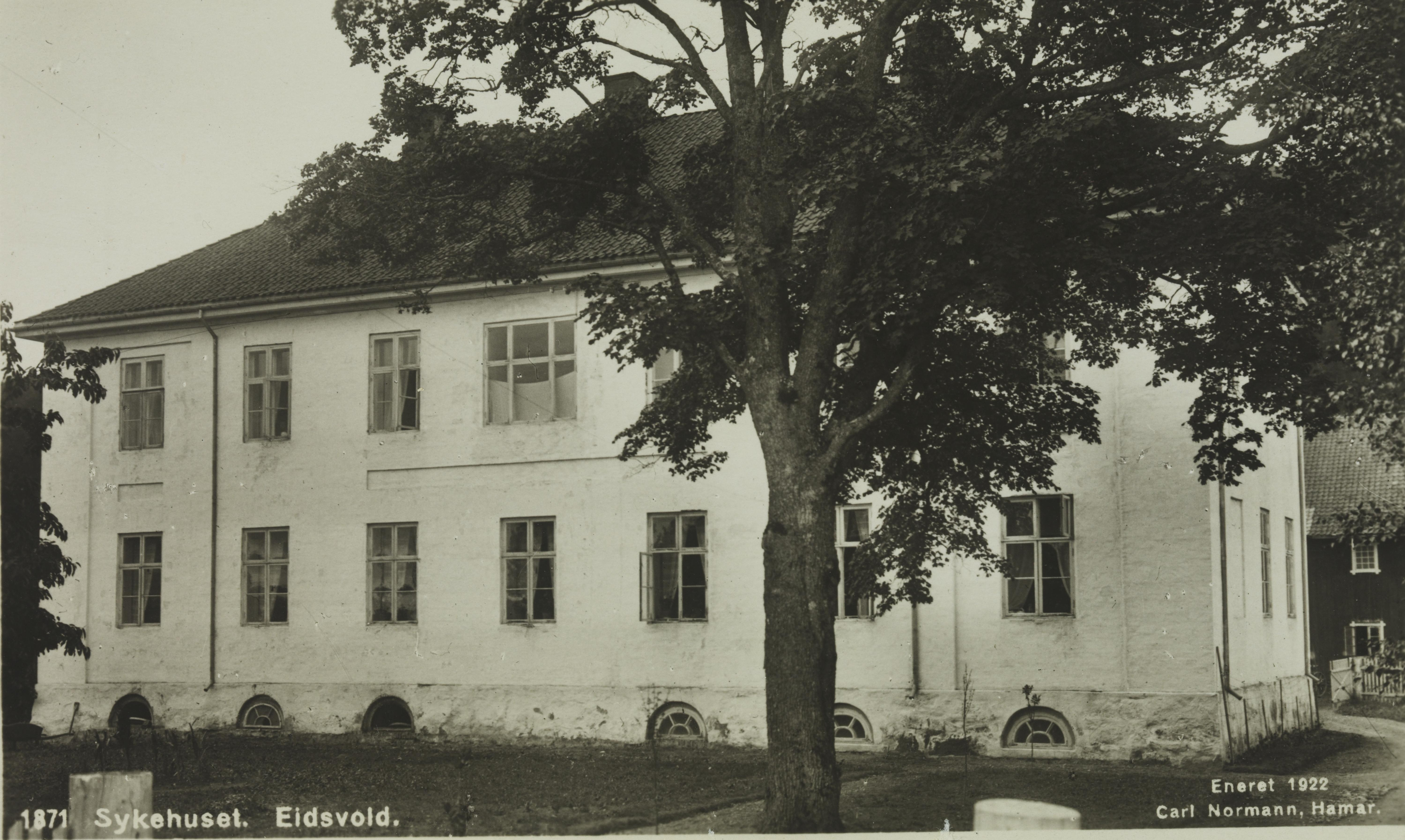 Bildet er hentet fra Nasjonalbibliotekets bildesamling Stensby, Eidsvoll, Akershus